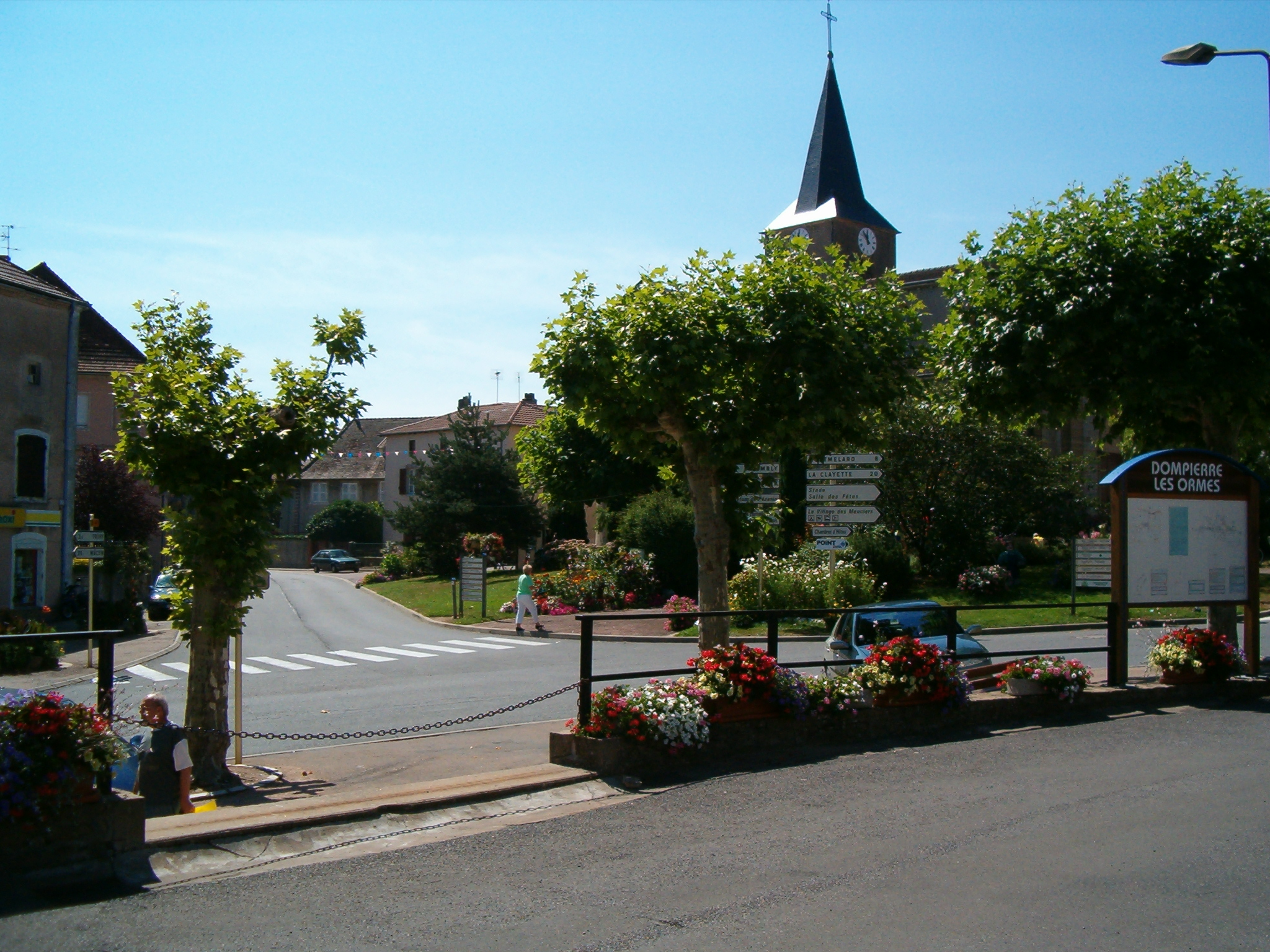 Dompierre-les-Ormes (France)